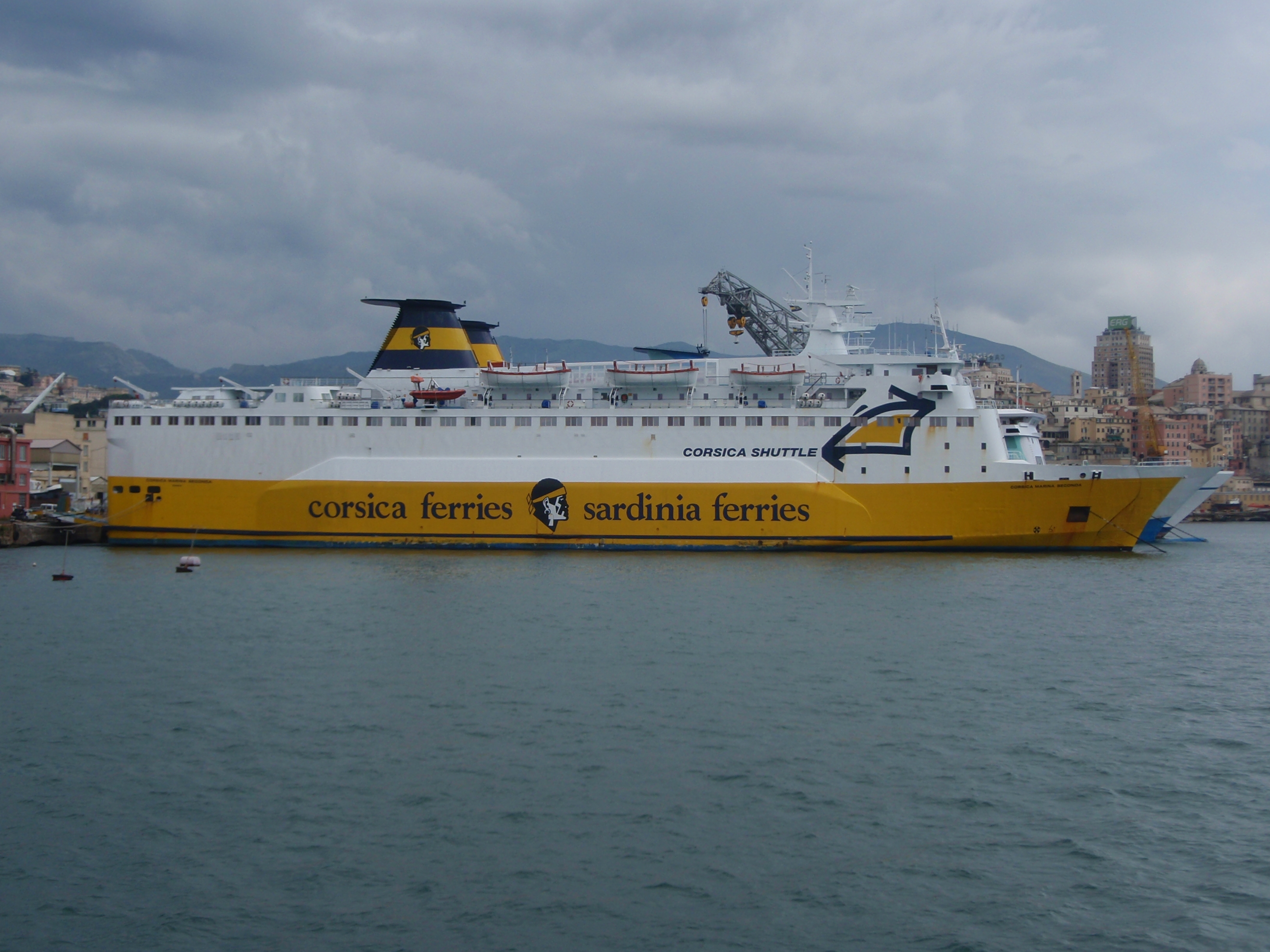 traghetto Corsica Marina Seconda in disarmo invernale a Genova